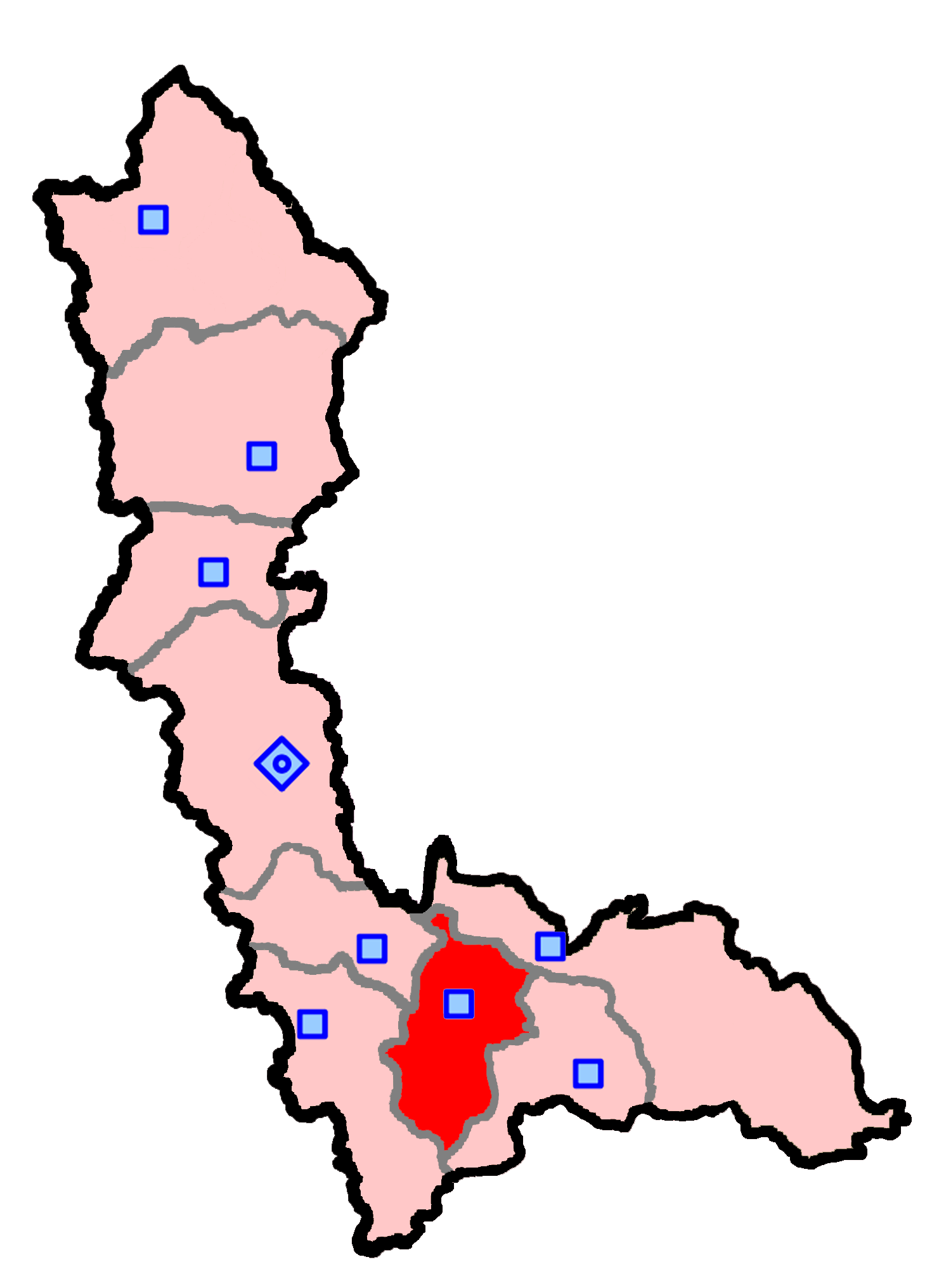 حوزهٔ انتخاباتی مهاباد برای انتخابات مجلس شورای اسلامی